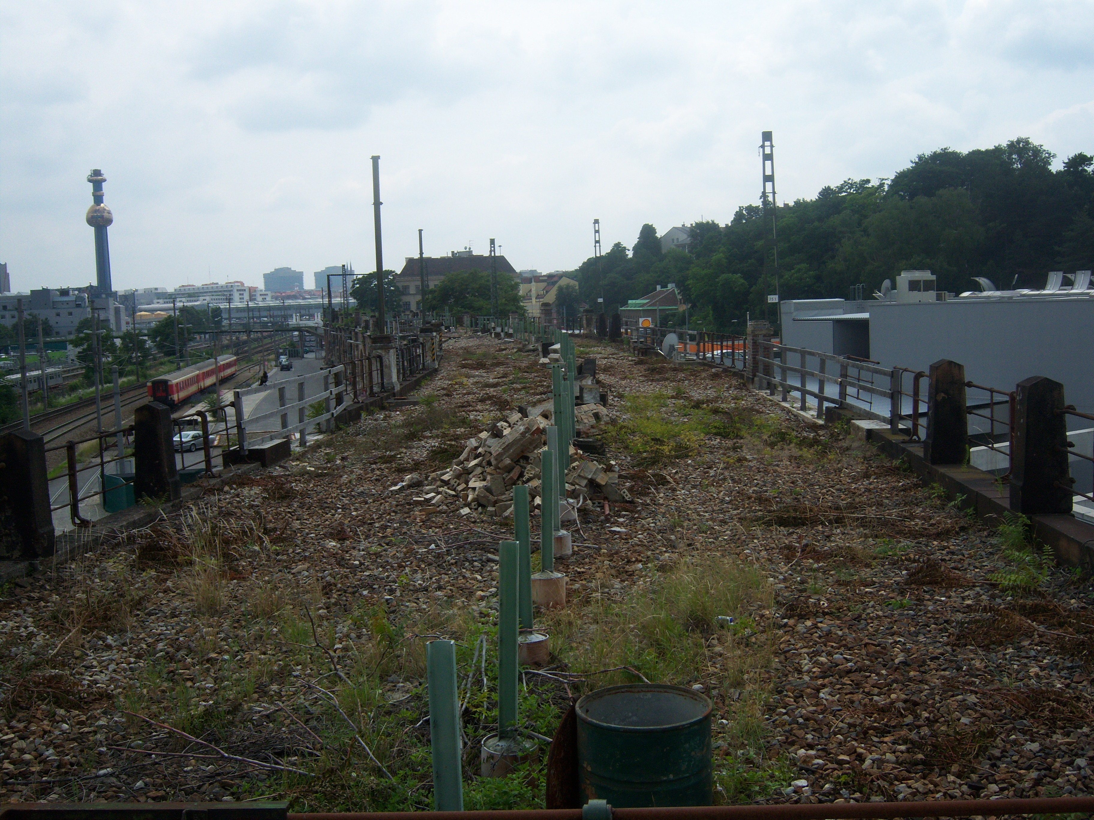 Der Heiligenstädter Ast der Wiener Stadtbahn